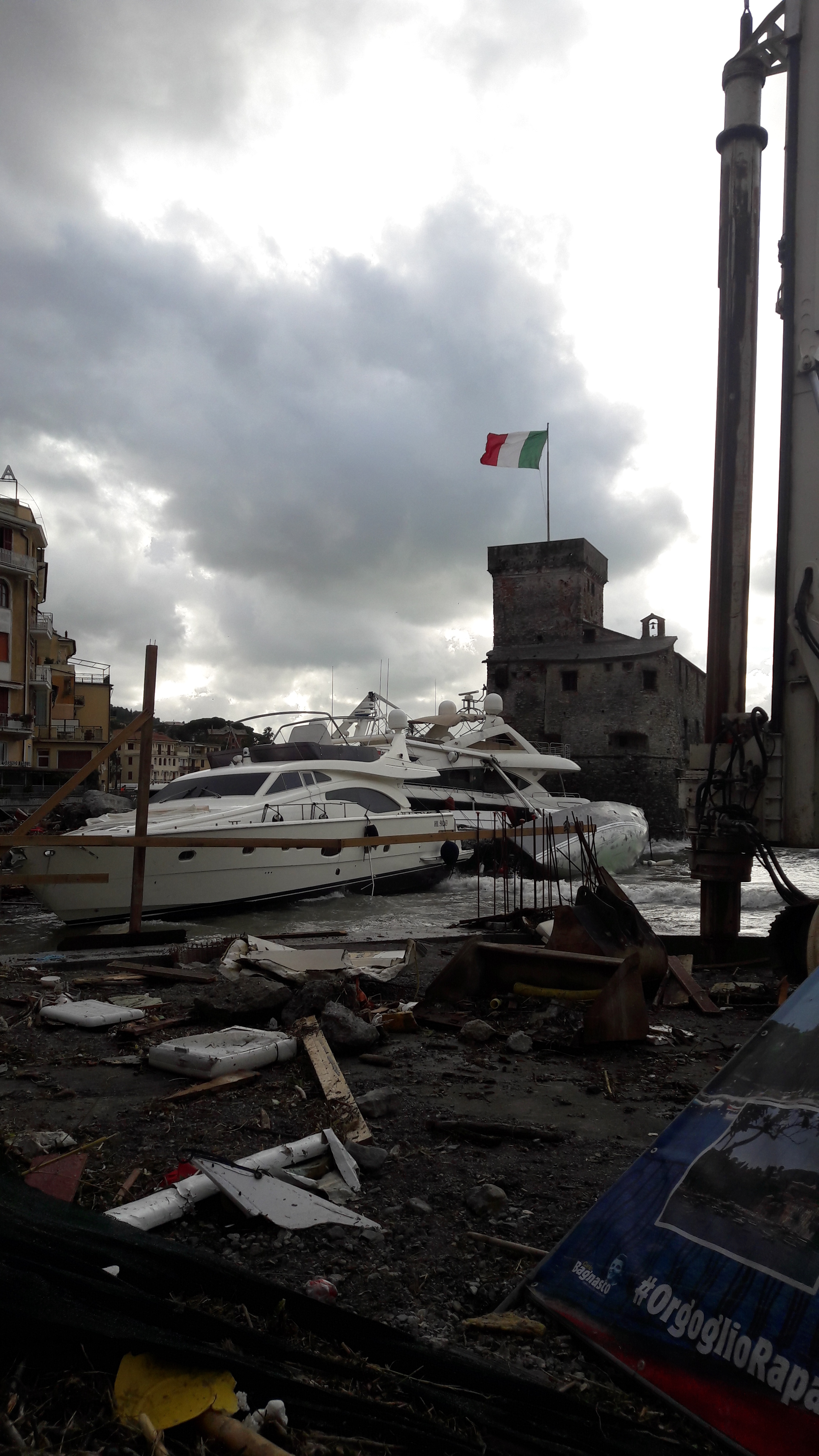 Particolare dei danni provocati dalla mareggiata del 29 e 30 ottobre 2018 a Rapallo, Liguria, Italia